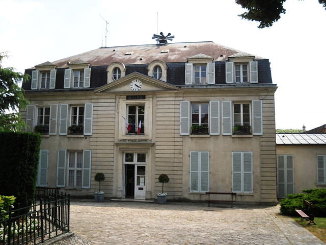 L'hôtel de ville de Bièvres (91)